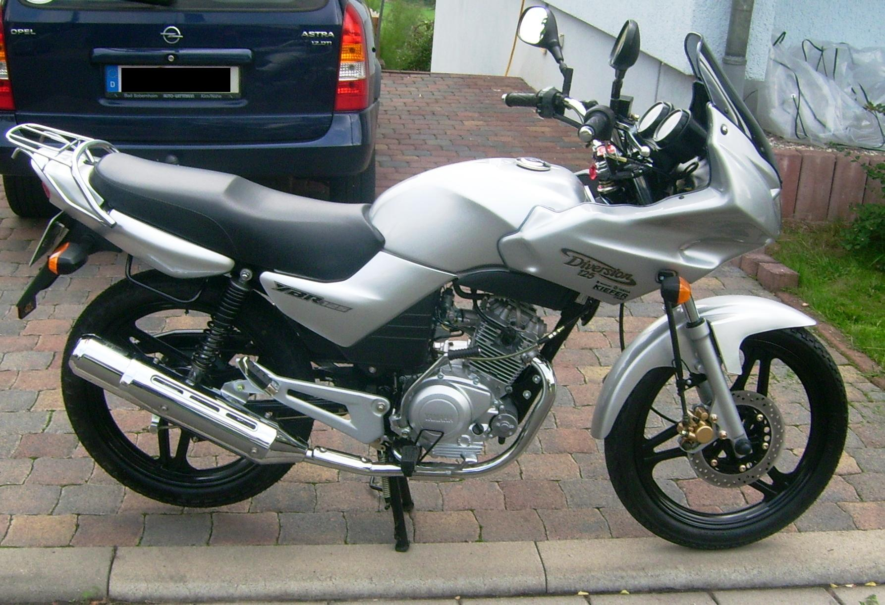 YBR 125 von der Seite